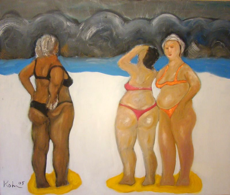 Tsunami